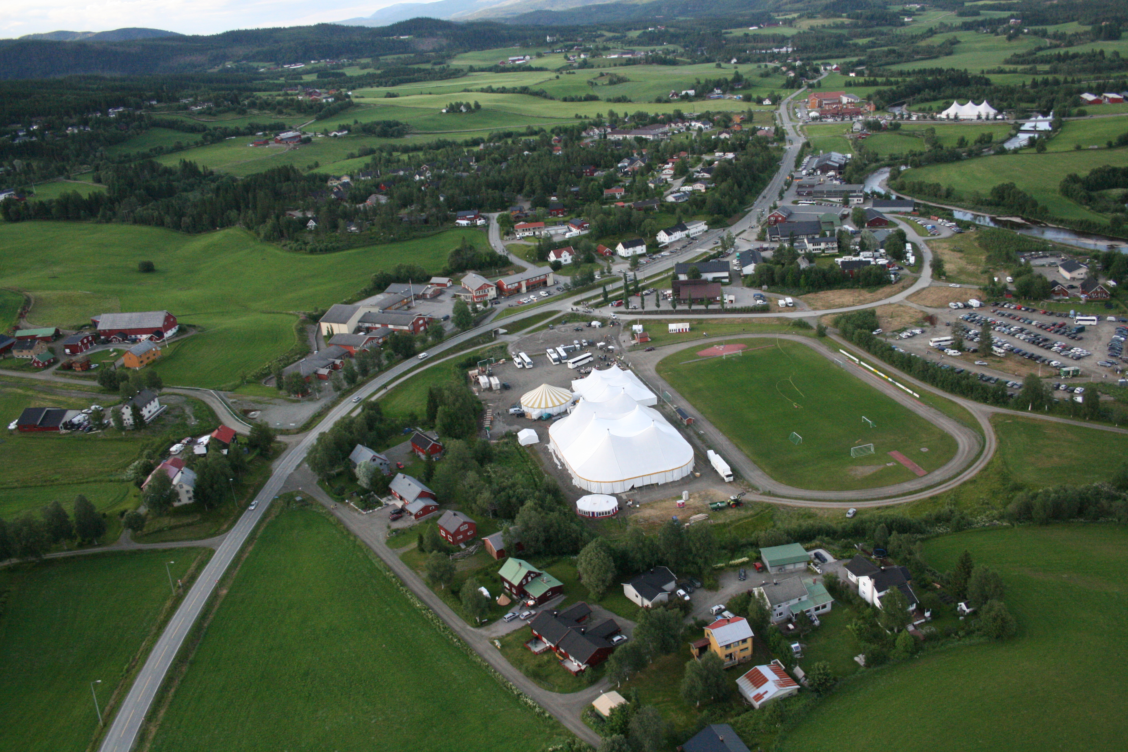 Høylandet frå lufta under Norsk revyfestival 2007